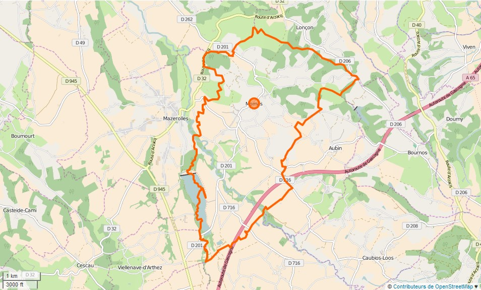 Momas Limite communale This map may be incomplete, and may contain errors. Don't rely solely on it for navigation.